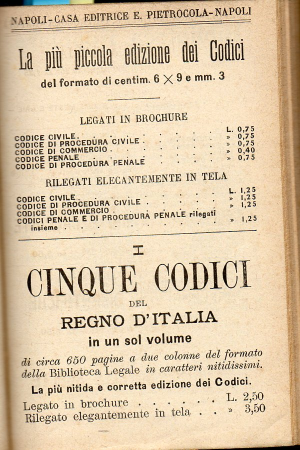 1896, pagina 47 del n.48 della Biblioteca Popolare E.Pietrocola